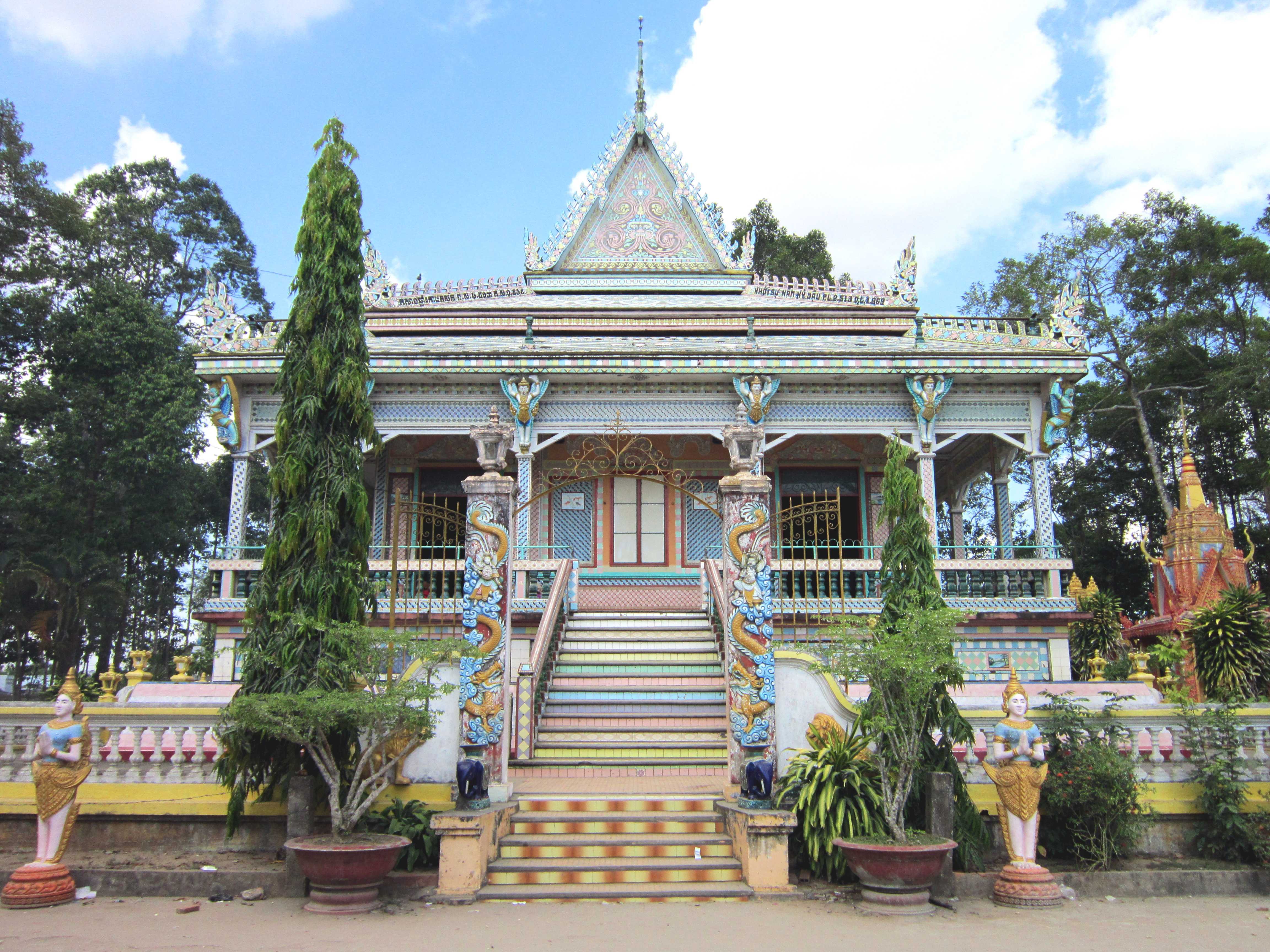 Chánh điện chùa Sà Lôn (tiếng Khmer: Wath Sro Loun, hay Wath Chro Luông, còn gọi là Chùa Chén Kiểu) là một ngôi chùa Khmer cổ của tỉnh Sóc Trăng (Việt Nam).